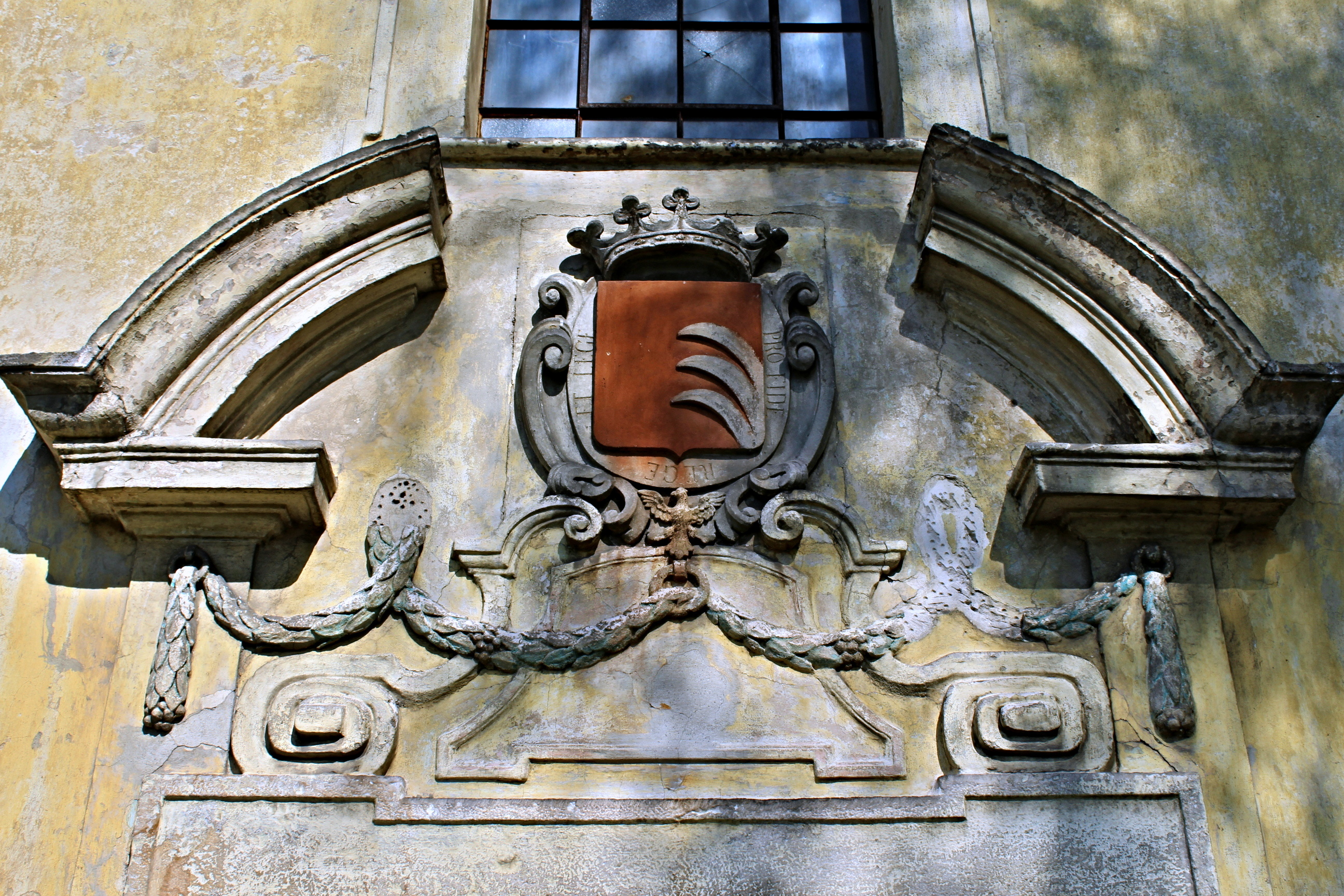 Velenice